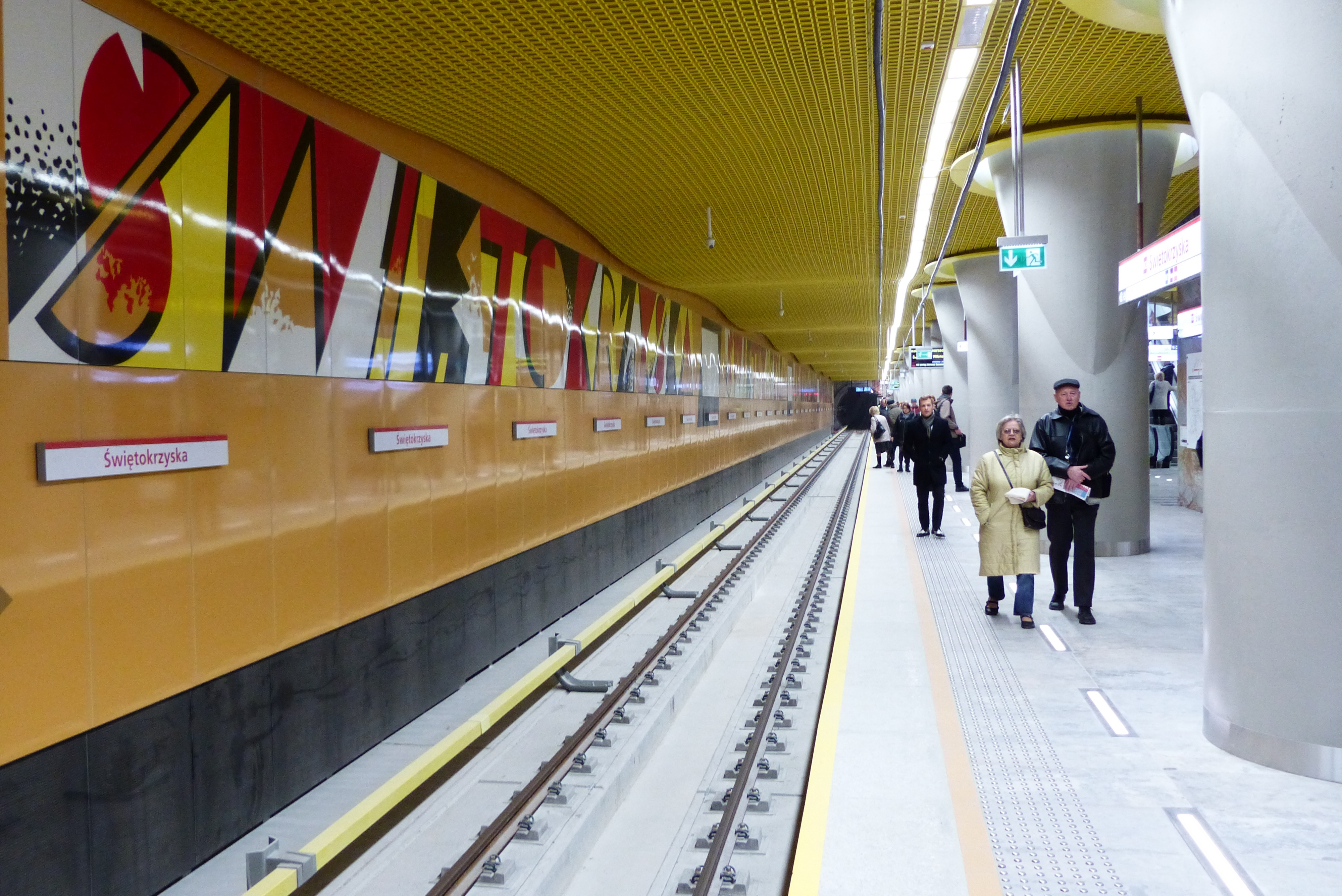 Peronu stacji Świętokrzyska na II linii warszawskiego metra - Opracowanie graficzne Wojciech Fangor